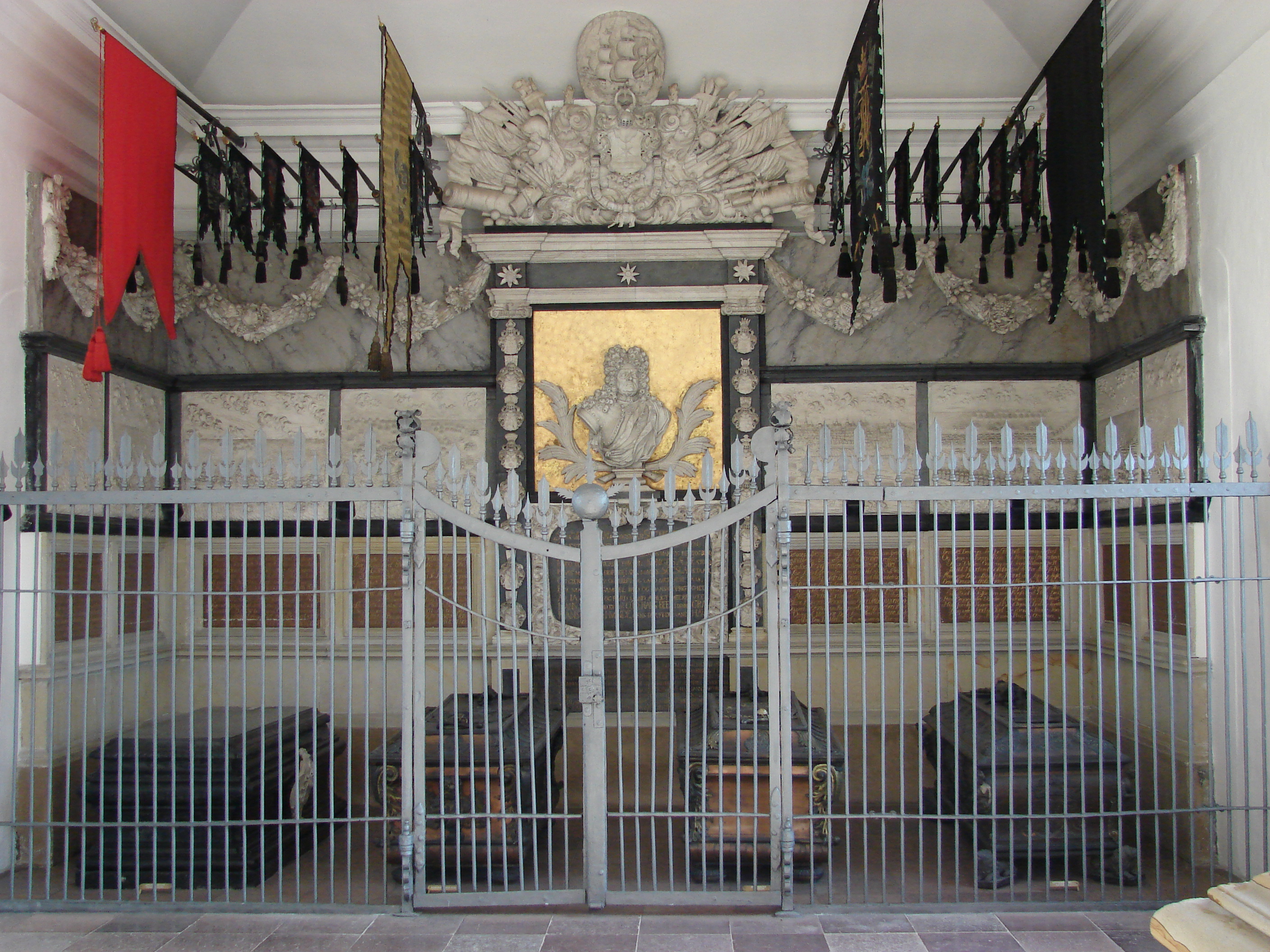 Gravmæle over admiral Niels Juel (1629-1697) i Det store gravkapel ved Holmens Kirke, København